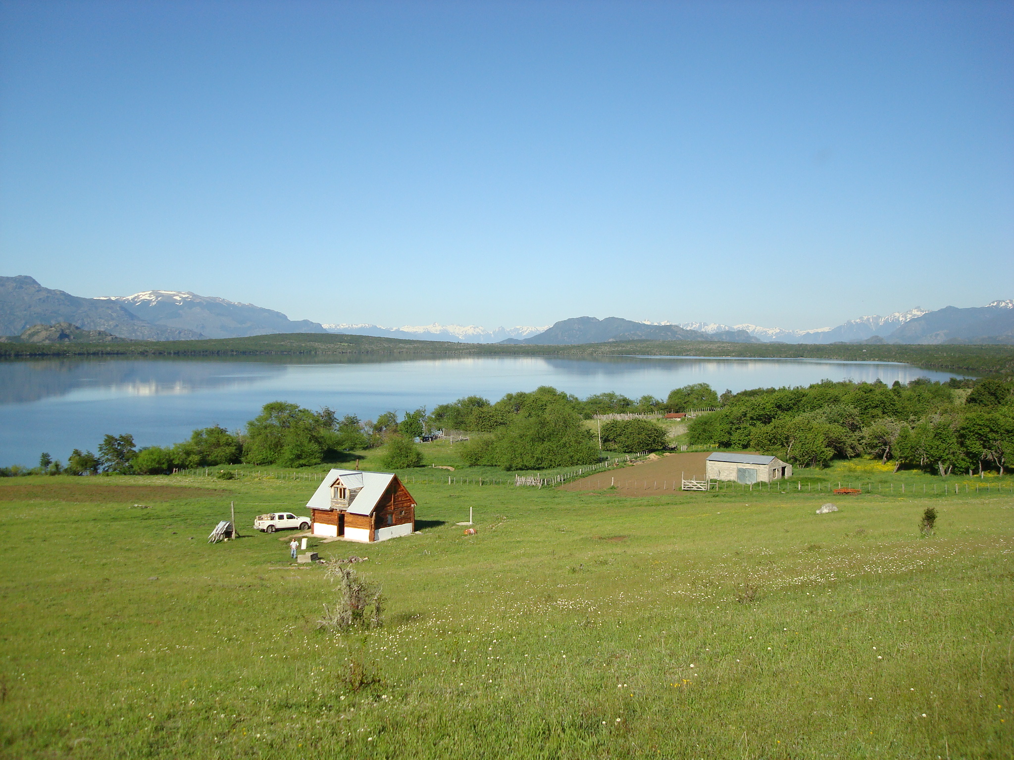 Atilio Viglione - Lago 4